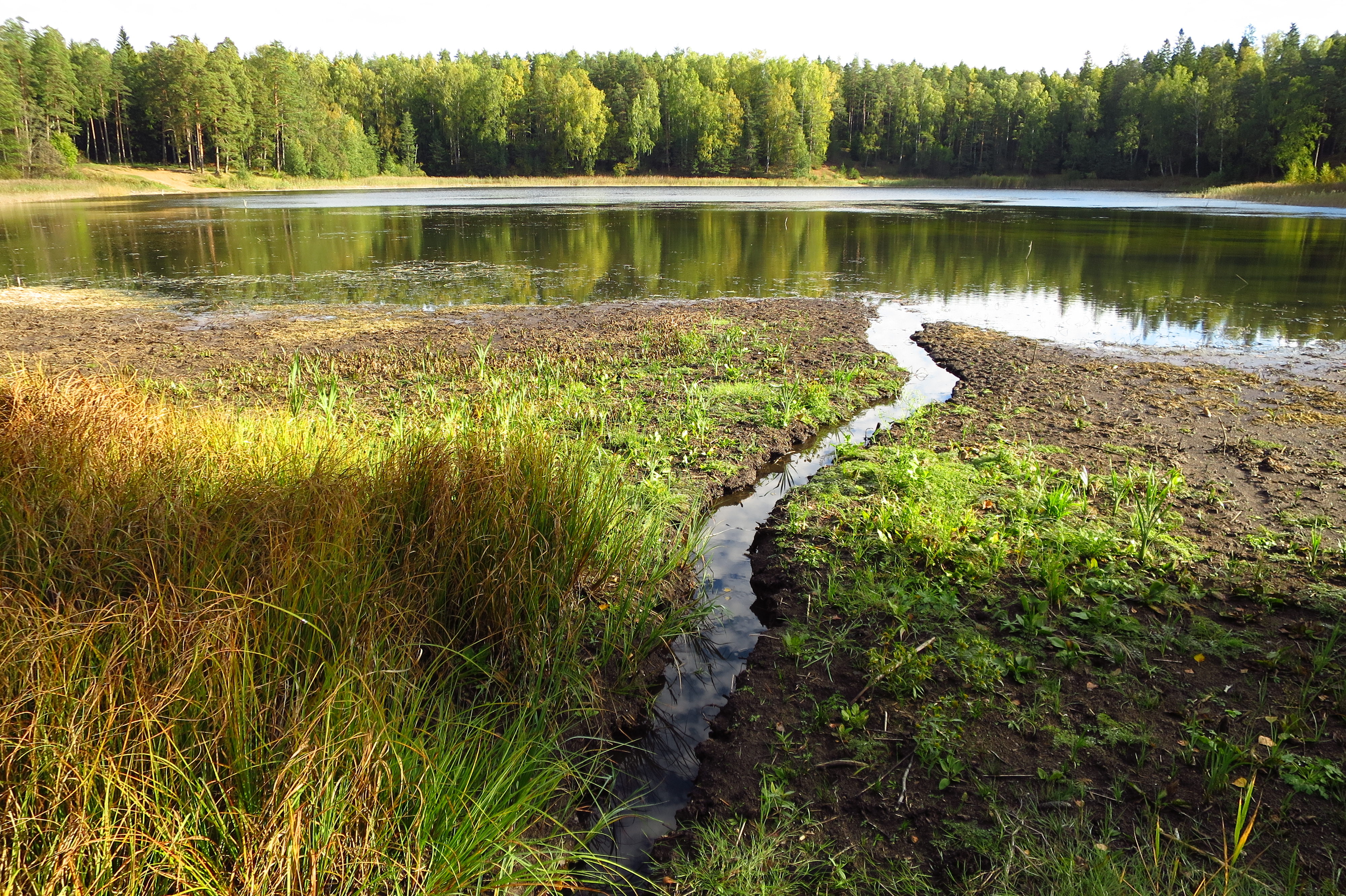 Kurtna Rääkjärv Kurtna MKAl